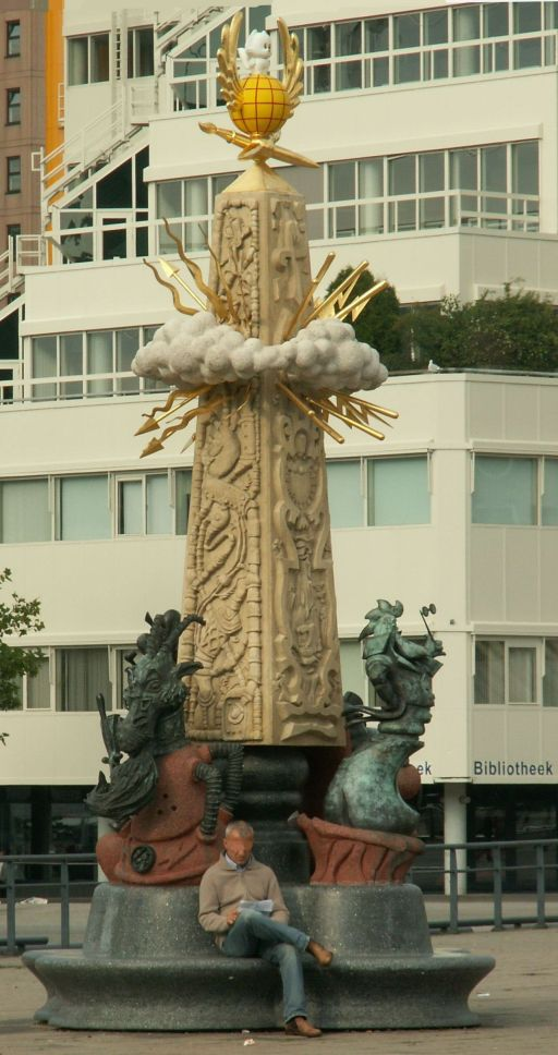 Sculpture "Hommage aan Marten Toonder" in Rotterdam/The Netherlands. Made by "De Artoonisten" in 2002.